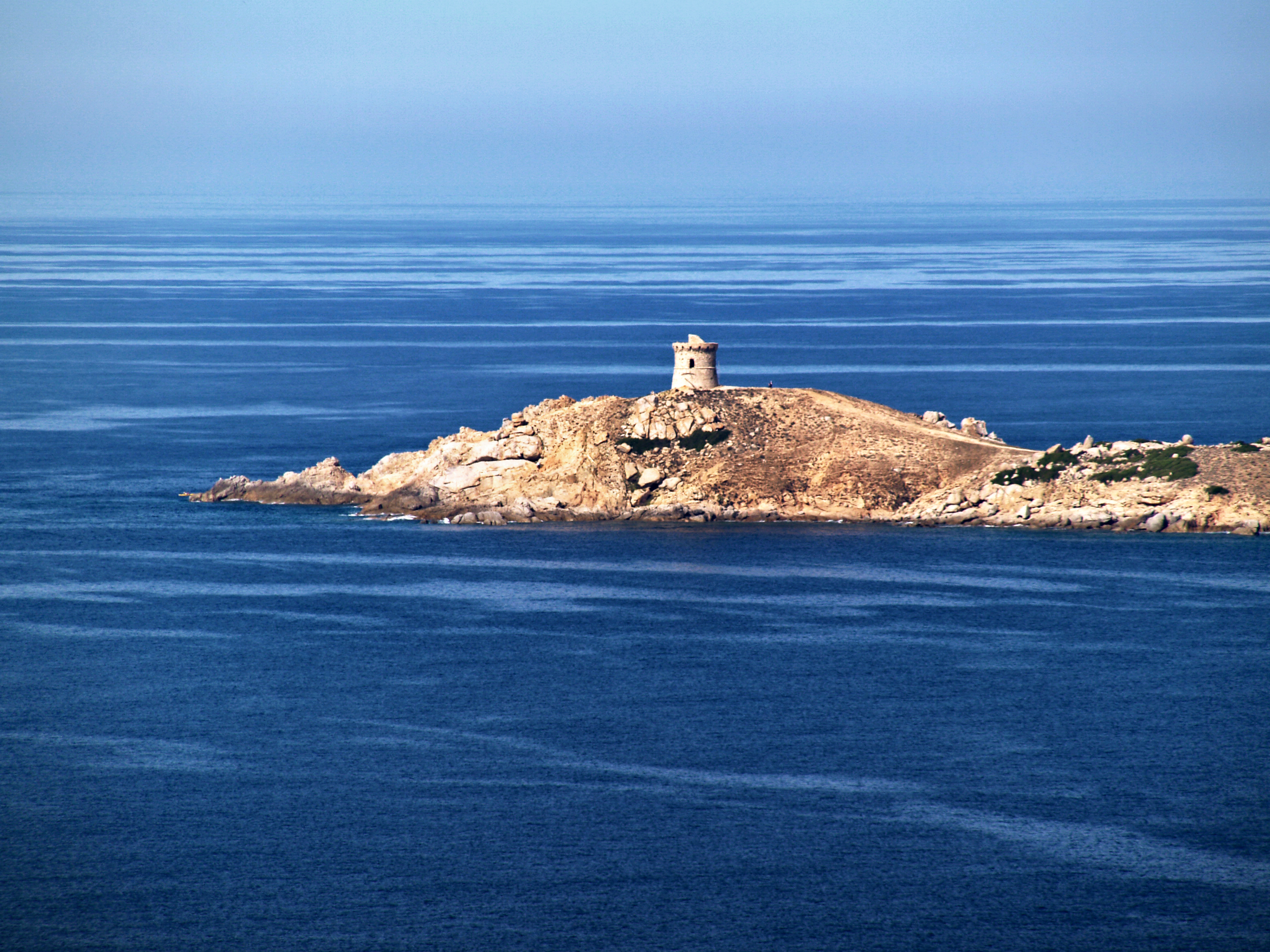 Cargèse (Corse) - Tour génoise d'Omigna (XVIe s.)